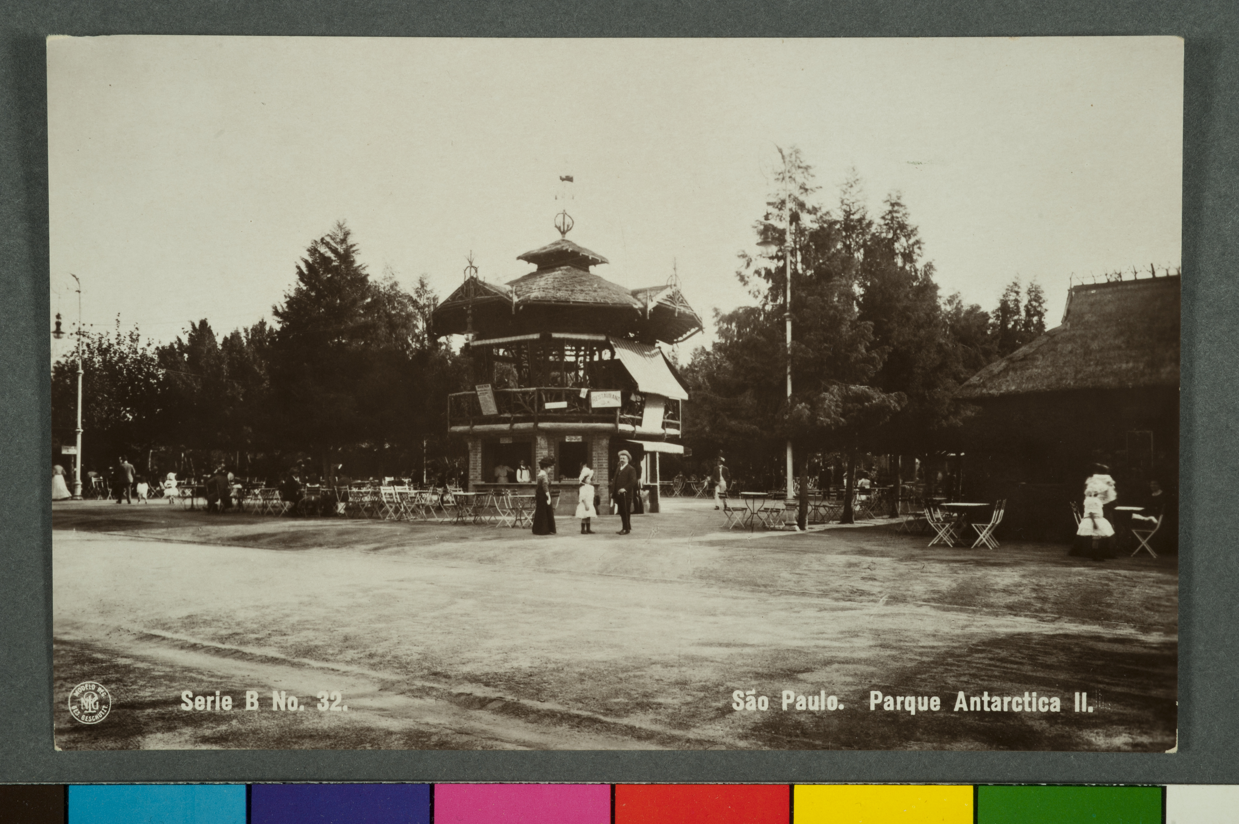 Obra que integra o acervo do Museu Paulista da USP.